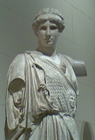 Phidias. Athena Lemnia in in the Staatliche Museum, Albertinum, Dresden. Plaster cast in Pushkin Museum, Moscow